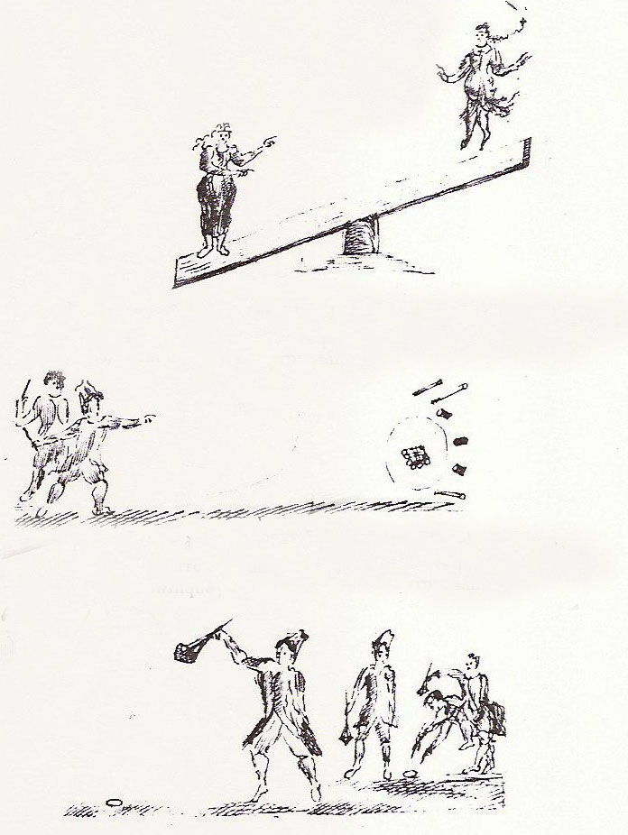 Croquis de voyage de Jacques Jubé : les jeux.